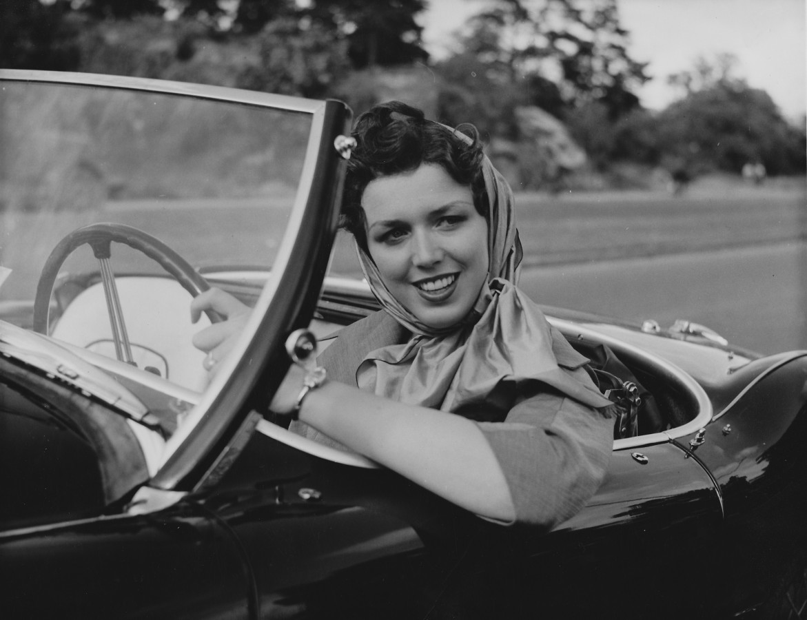 Bibi Nyström från filmen Skrattbomben 1954.